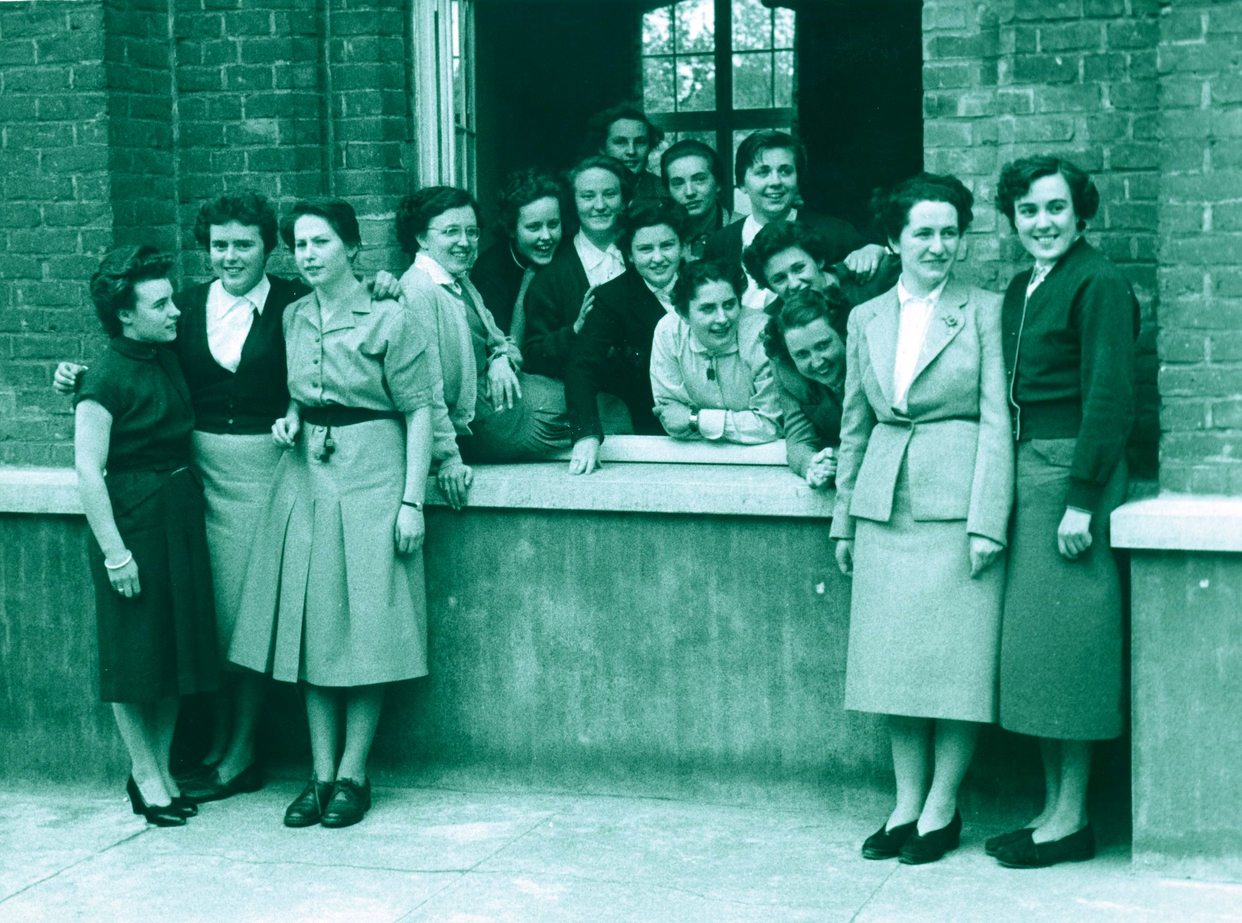 In de jaren vijftig is welvoegelijkheid bij de dames een must.